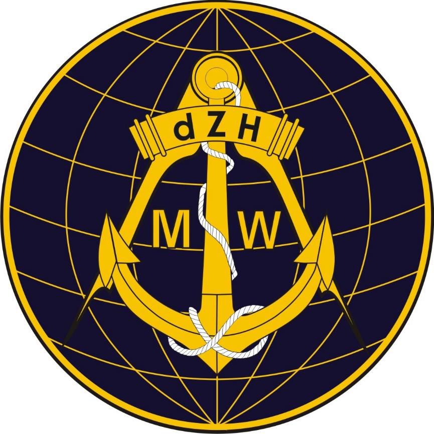 Dywizjon Zabezpieczenia Hydrograficznego Marynarki Wojennej – oznaka rozpoznawcza na mundur wyjściowy – 2019, Polska.